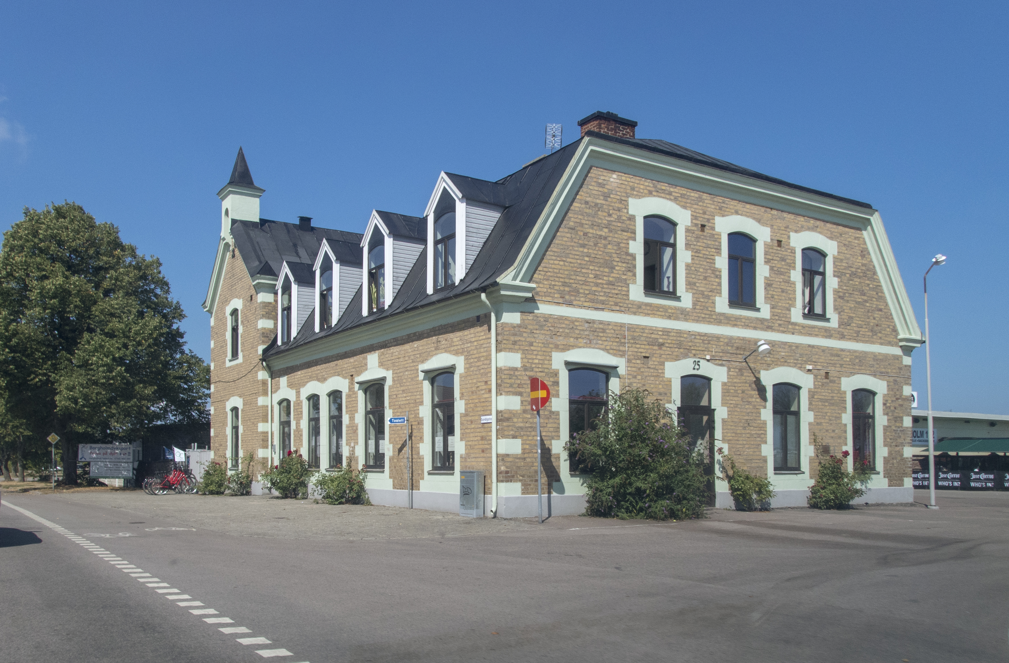 Borgholms station invigd 1906 för Borgholm–Böda Järnväg